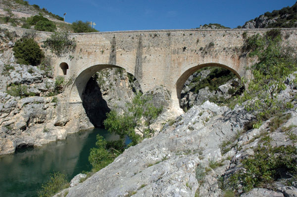 Pont del Diable. Sant Guilhem del Desert. Llenguadoc, França